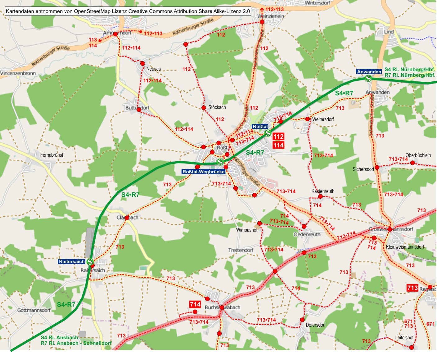 Nahverkehrslinien in Roßtal